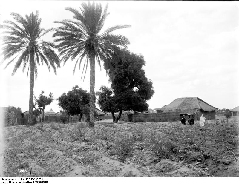 Tabora, Eingeborenen- Hütten